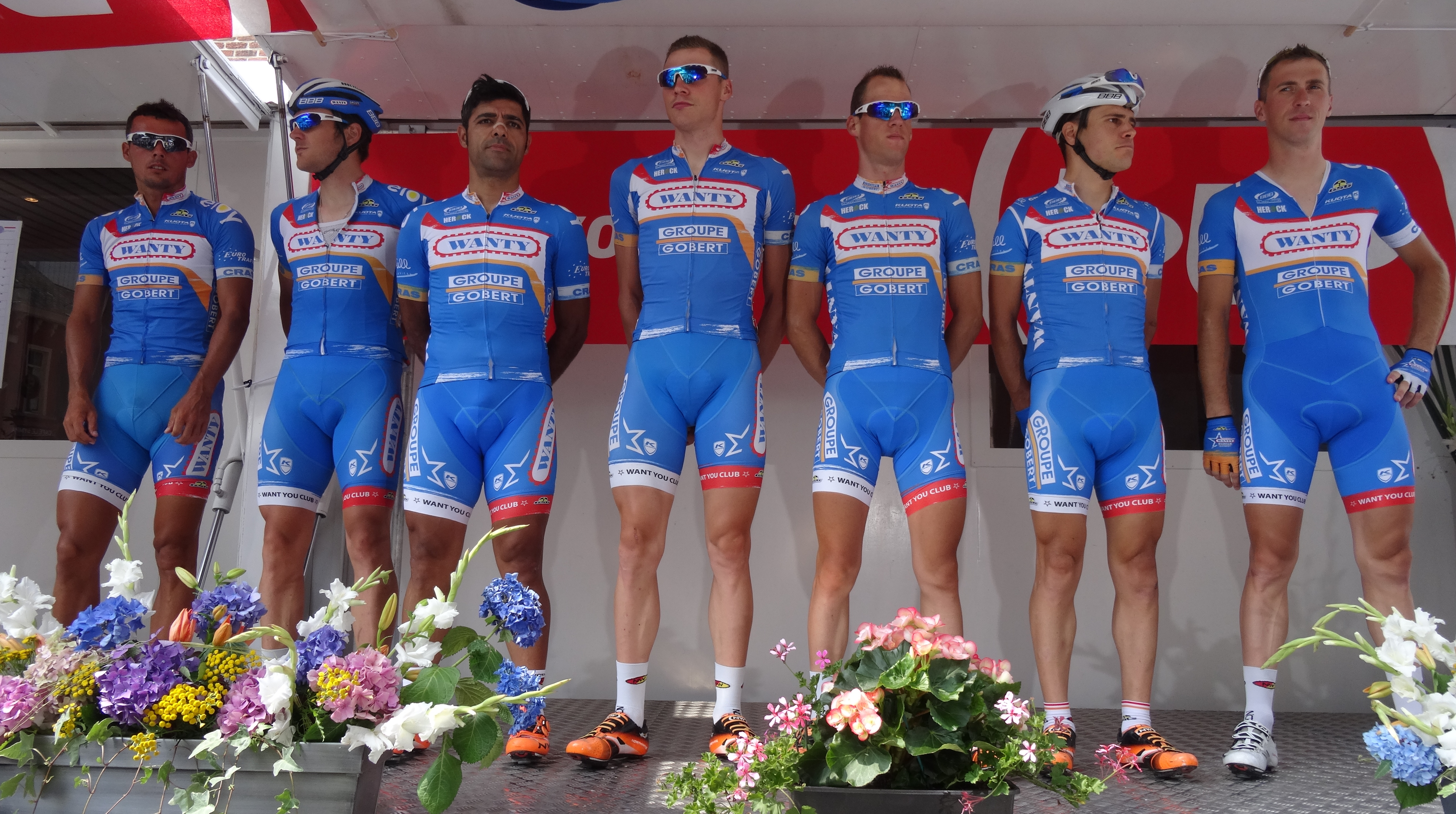 Reportage photographique réalisé le samedi 26 juillet à l'occasion du départ de la première étape du Tour de Wallonie 2014 à Frasnes-lez-Anvaing, Belgique.